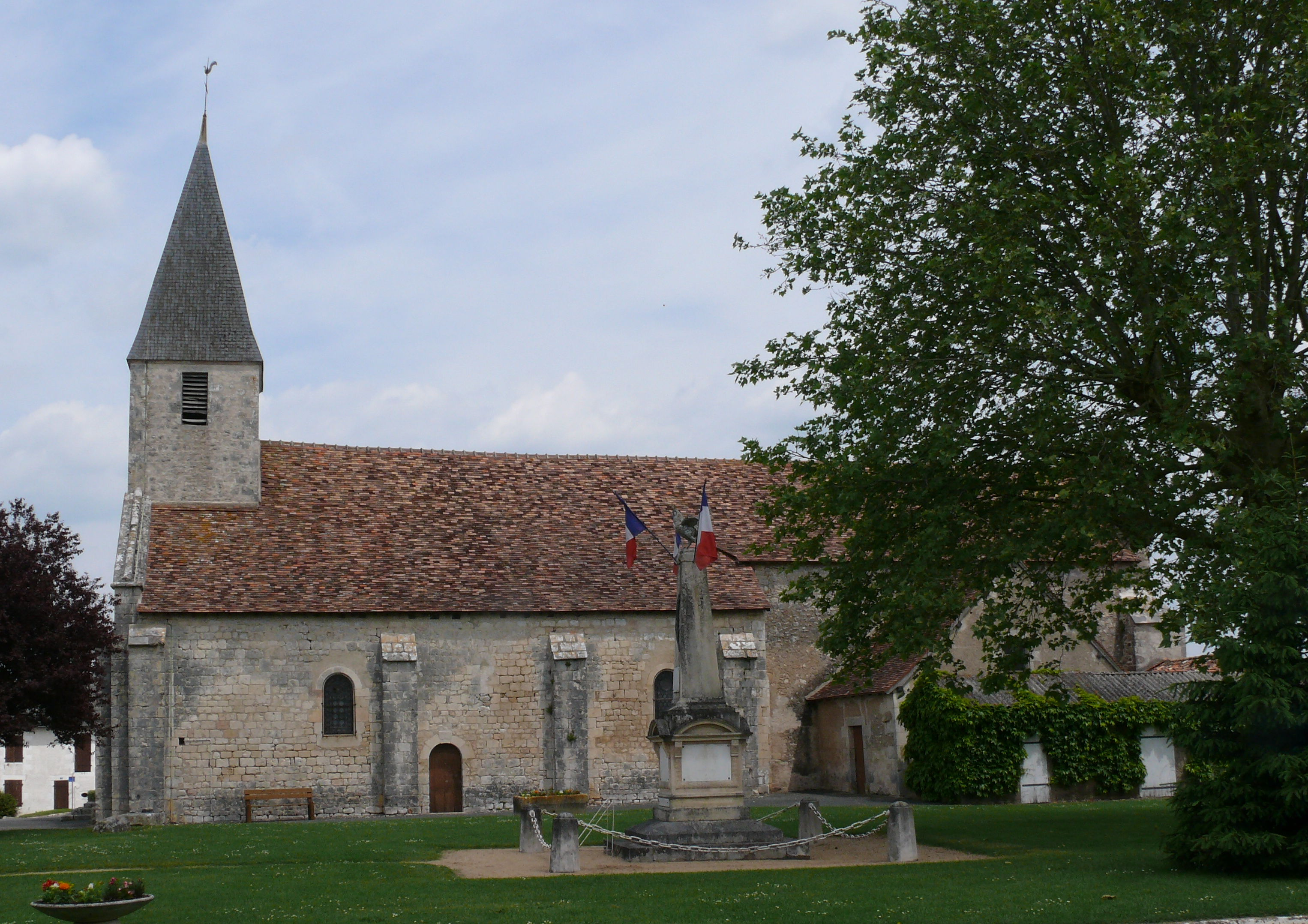 église Saint-Hilaire de Paizay-le-Sec (France, Vienne)